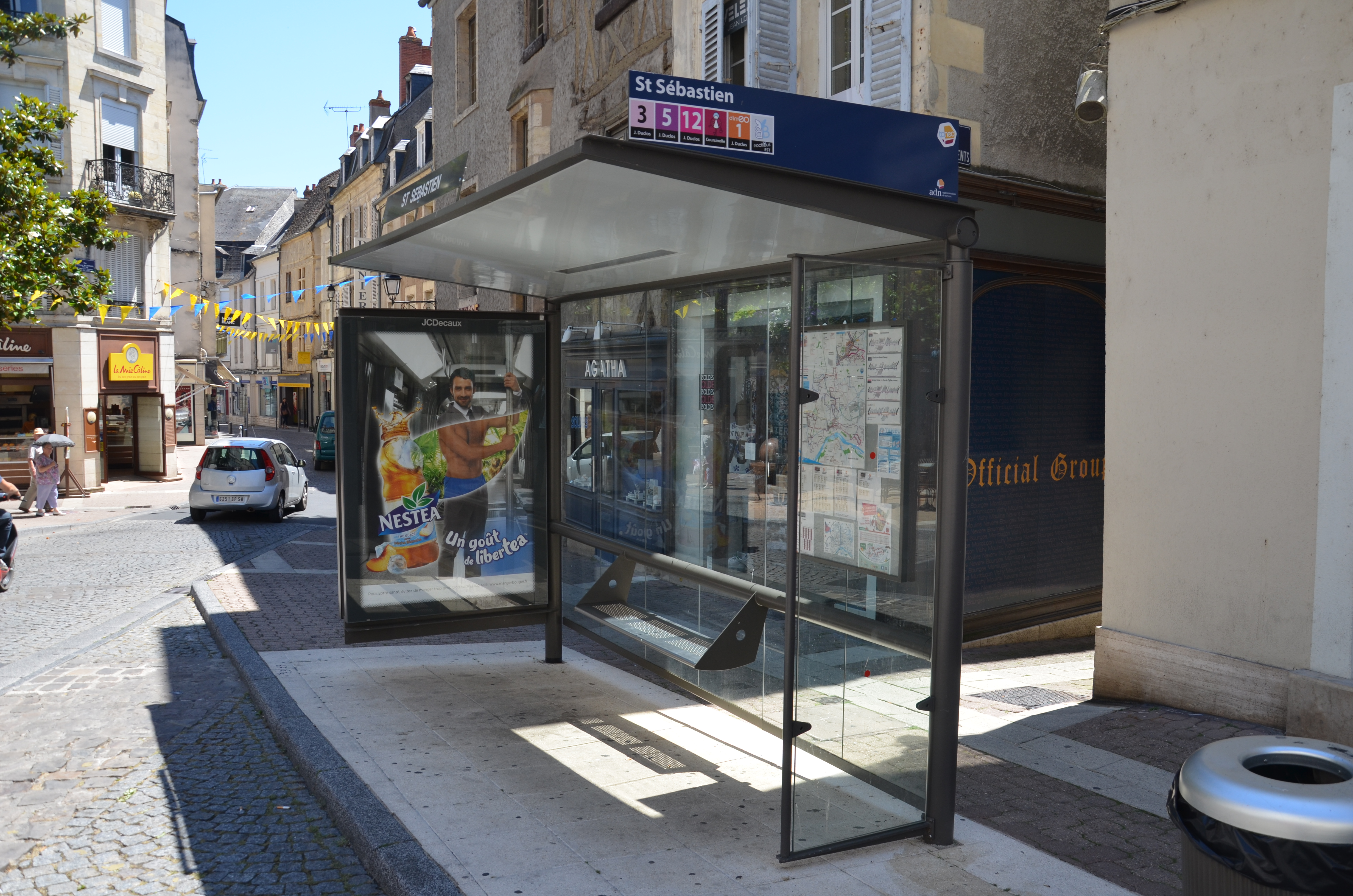 Abribus "Saint-Sébastien" sur le réseau Taneo.